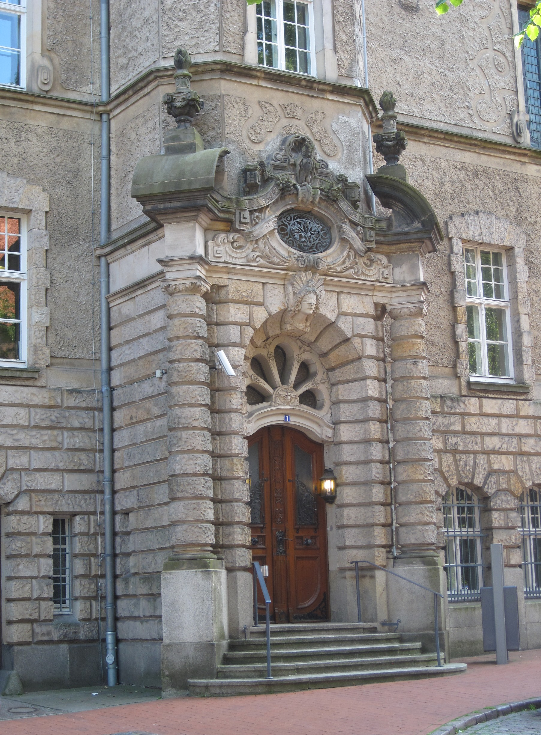 Gebäude des Landgerichts Stade und Amtsgerichts Stade, Wilhadikirchhof 1 in Stade.